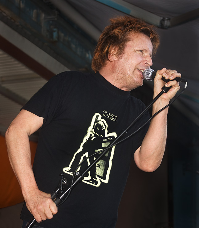 Tumppi Varonen esiintymässä Kallio Kukkii -tapahtumassa Helsingissä